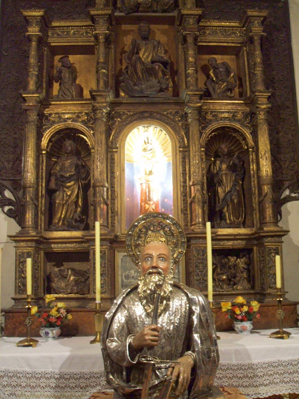 Zaragoza - Iglesia San Pablo